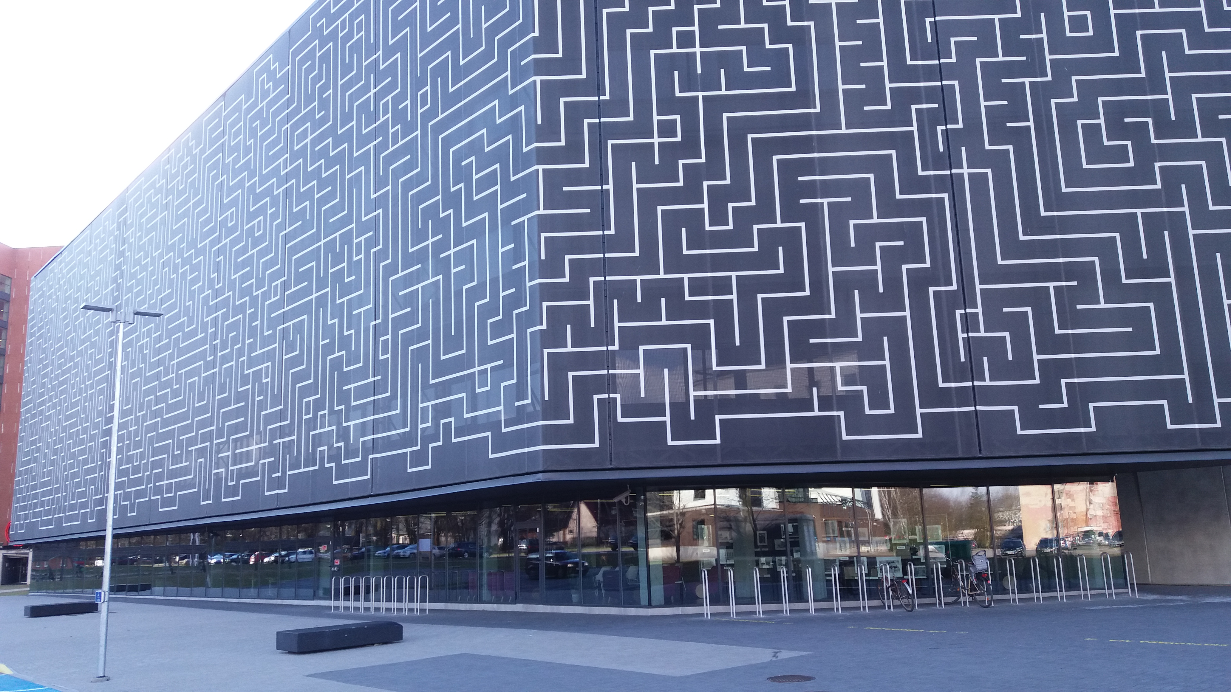 Rahvusarhiivi peahoone Noora Tartus, Nooruse 3